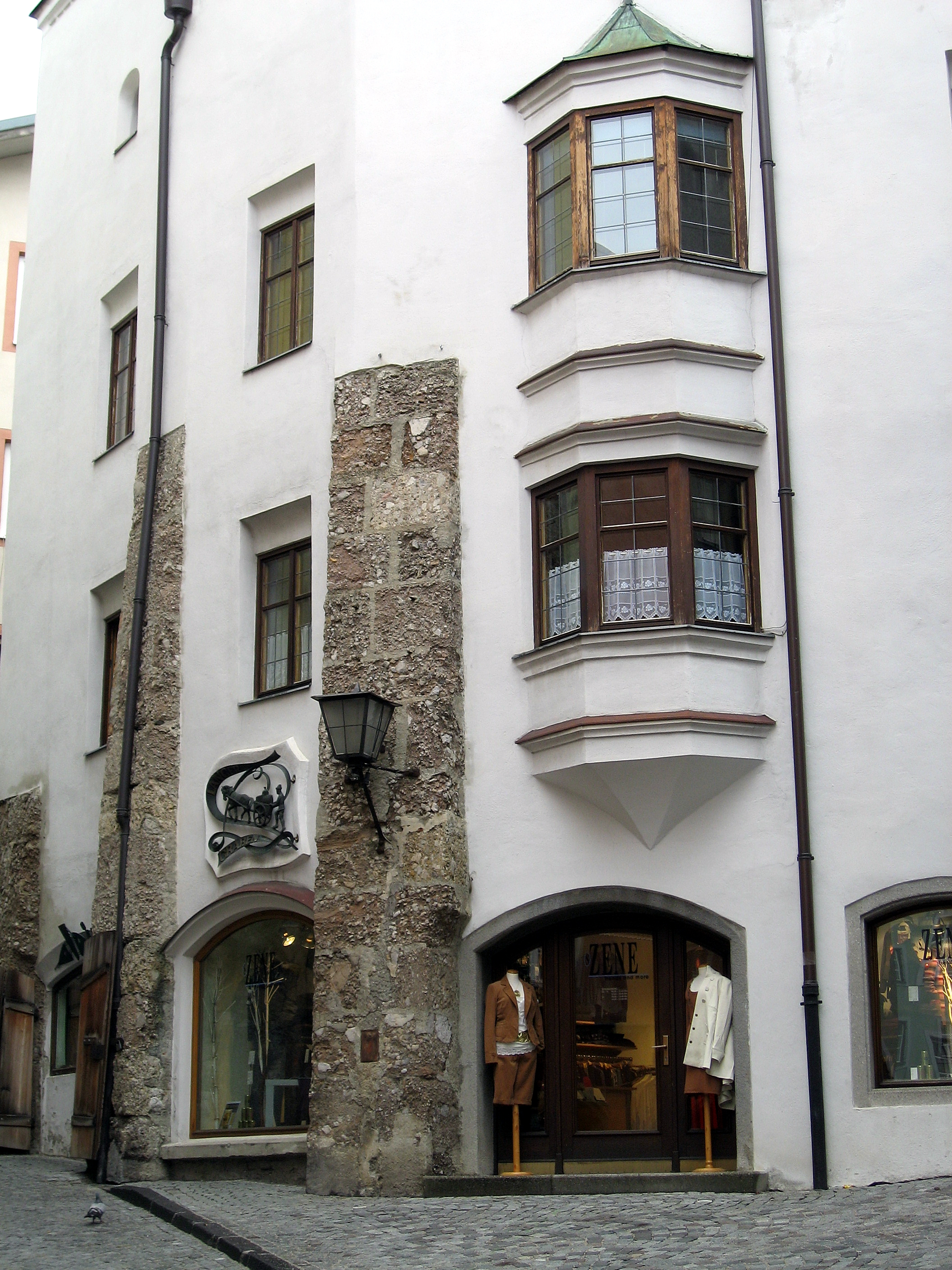 Österreich, Hall in Tirol, mittelalterliche Altstadt, Haus Kurzer Graben 1